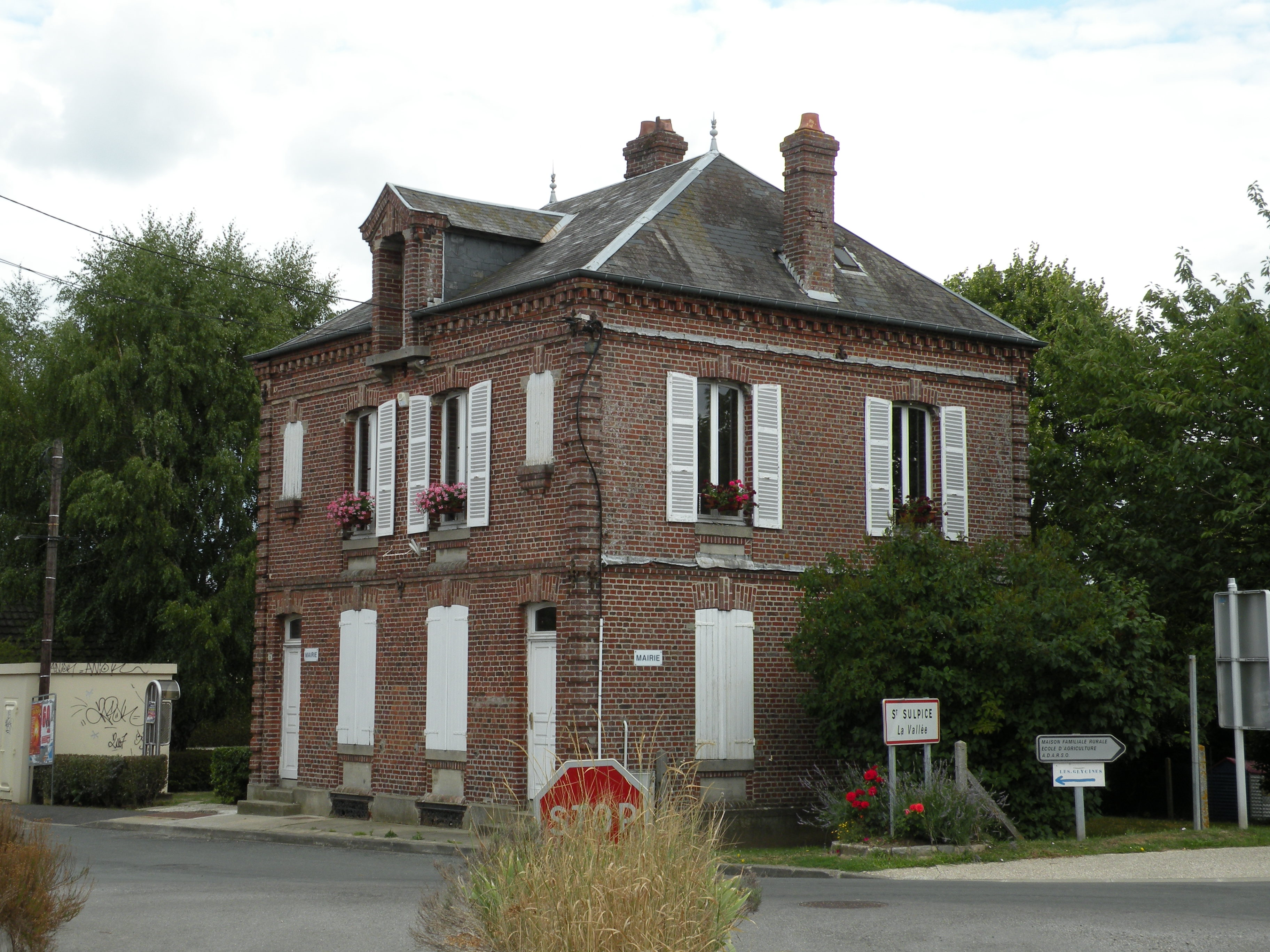 mairie de Saint-Sulpice (Oise)